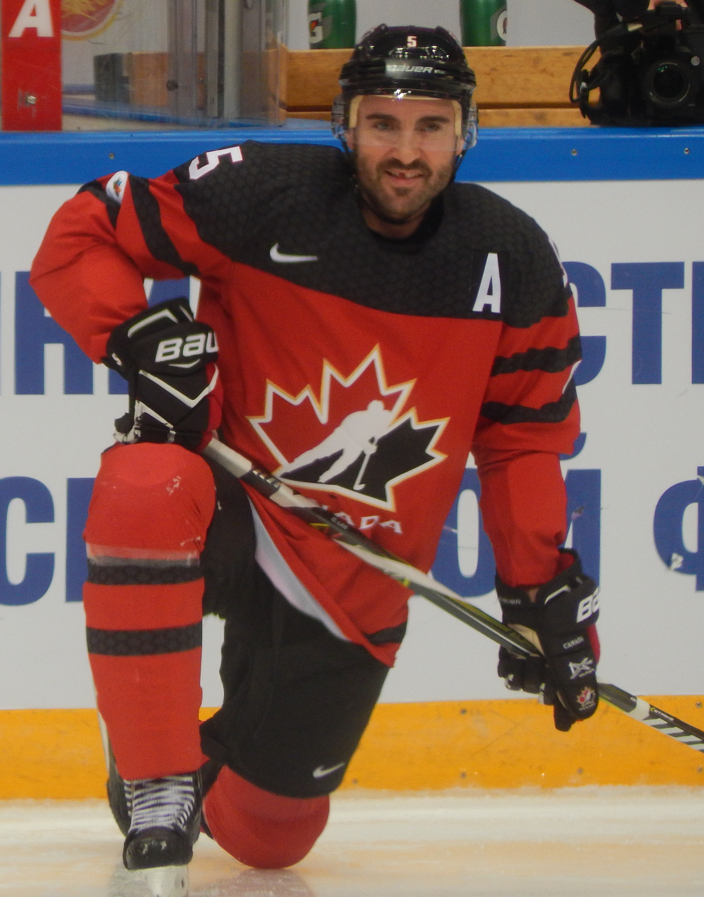 Кубок Первого Канала 2017, матч Чехия - Канада (15 декабря 2017) 5 LEE,Chris